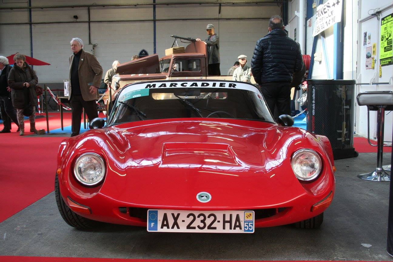 Vue de face d'une Marcadier Barzoï